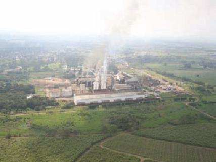 Vista Aerea Del Ingenio Tres Valles, En Miniatura